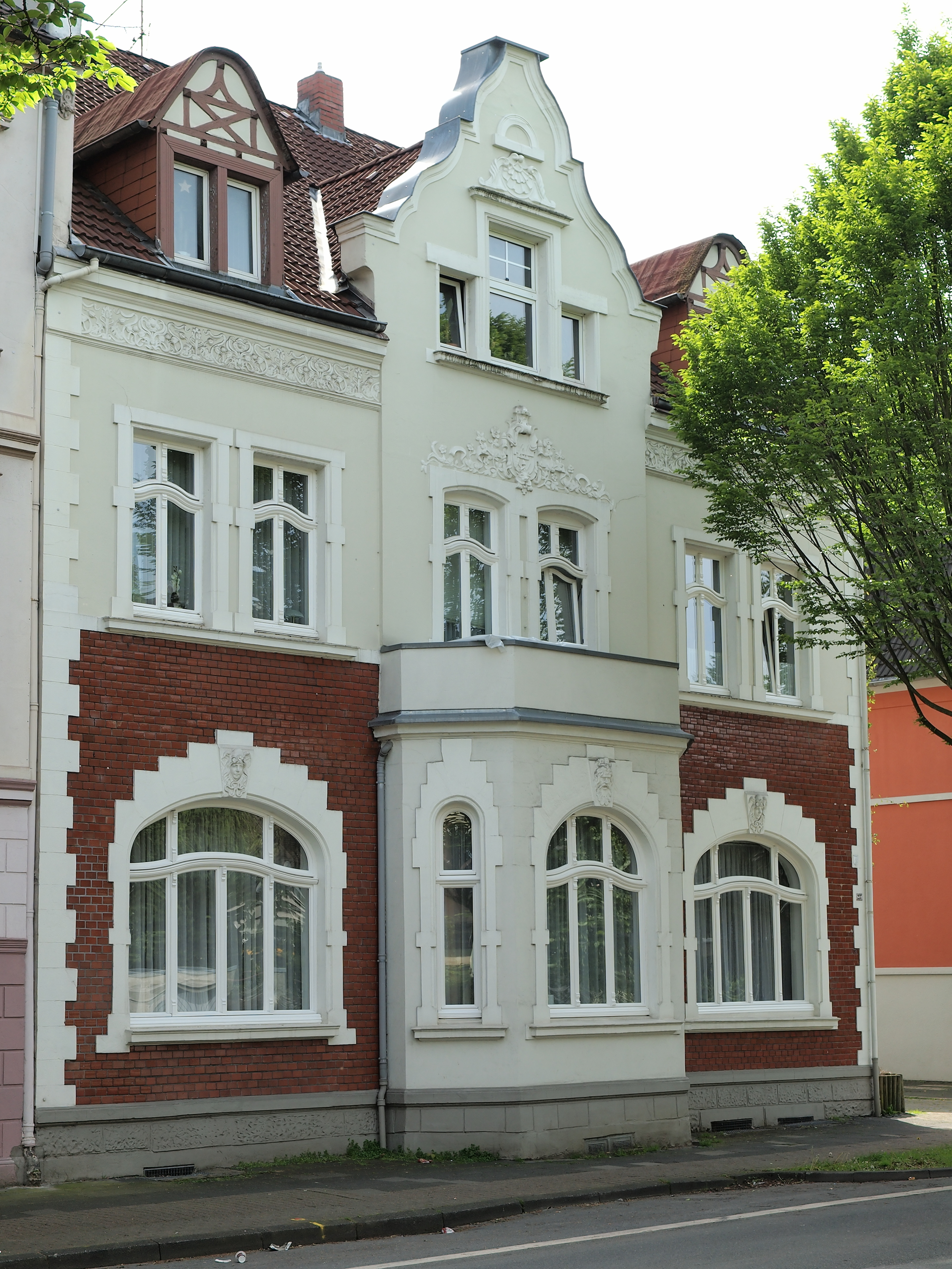 Wohngebäude in Herne-Röhlinghausen, Baudenkmal